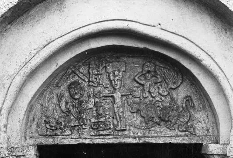 Tympanon, huvudportalen Linderöds kyrka